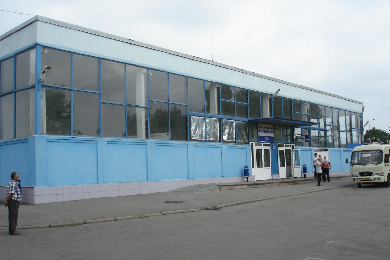 Автовокзал г. Шахты